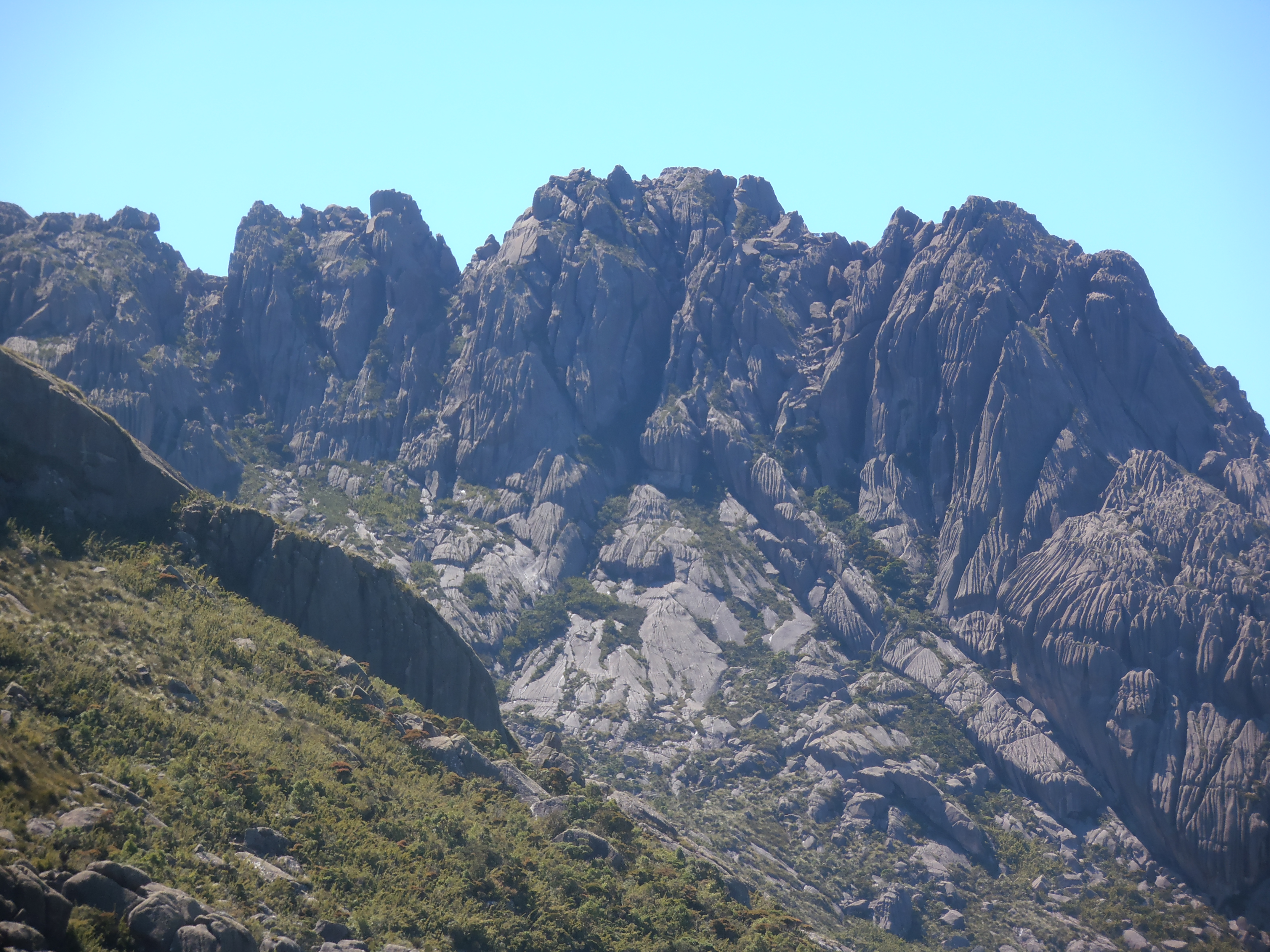 Fotografia tirada da parte alta do parque, próximo ao Abrigo Rebouças